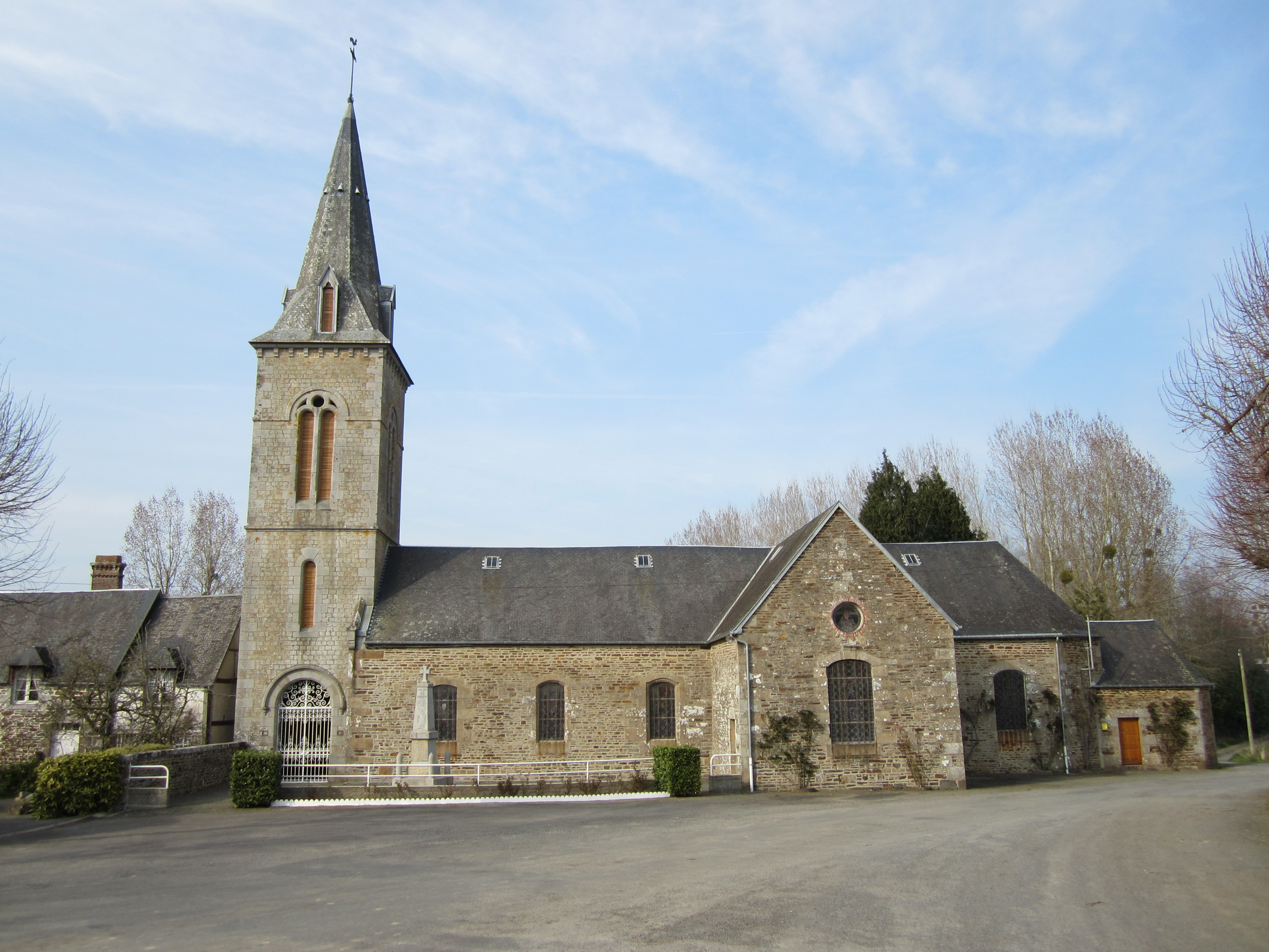 Saint-Pierre-de-Cresnays